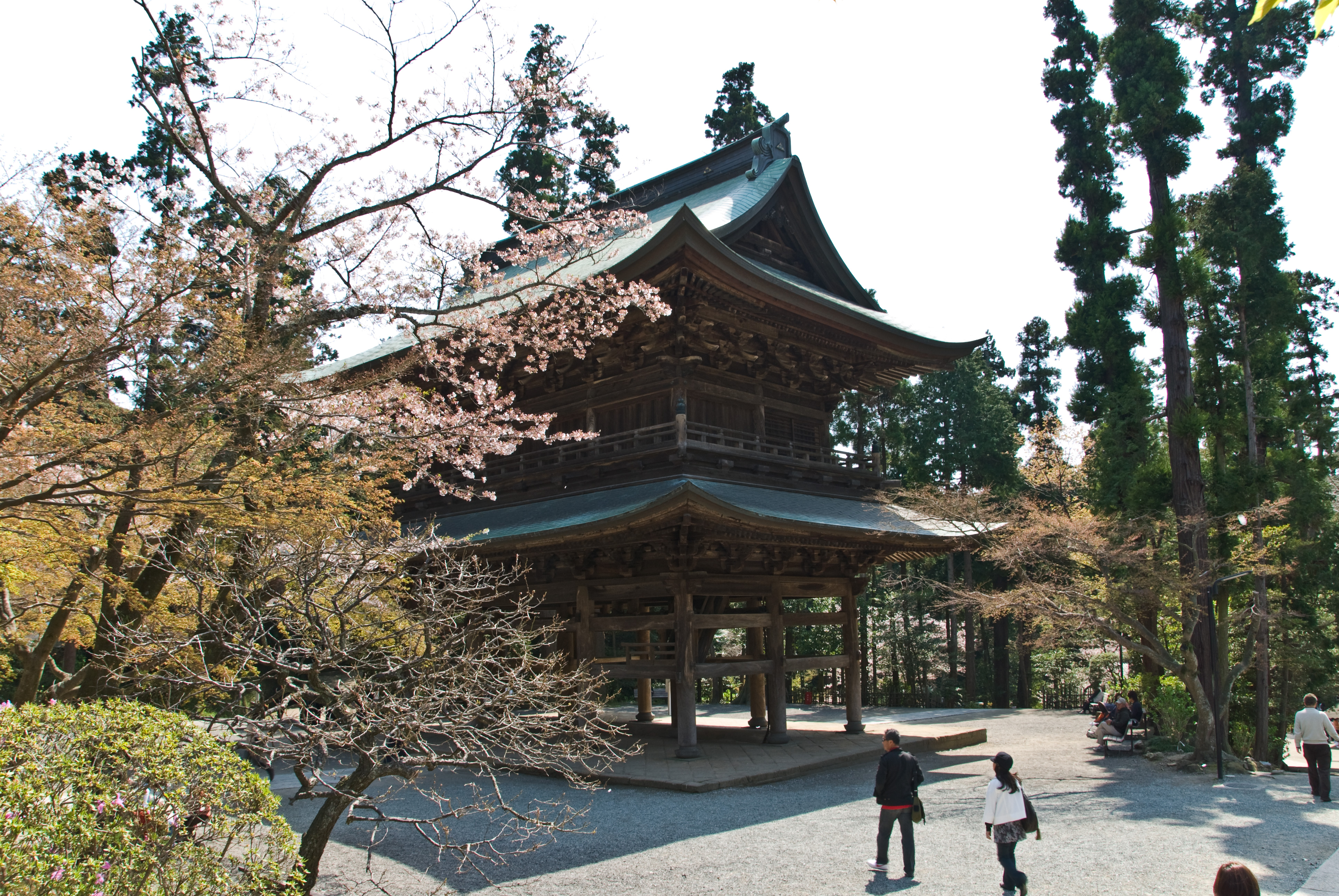 The garden at the Engaku-ji, Kita-Kamakura, Japan